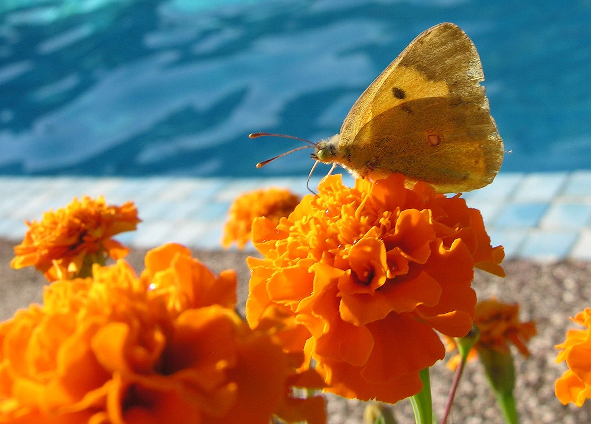 Bolboreta fotografada ó redor das 20 h. do 3 de agosto de 2006 en Bastavales, Brión, Galicia Publish by= Luis Miguel Bugallo Sánchez.